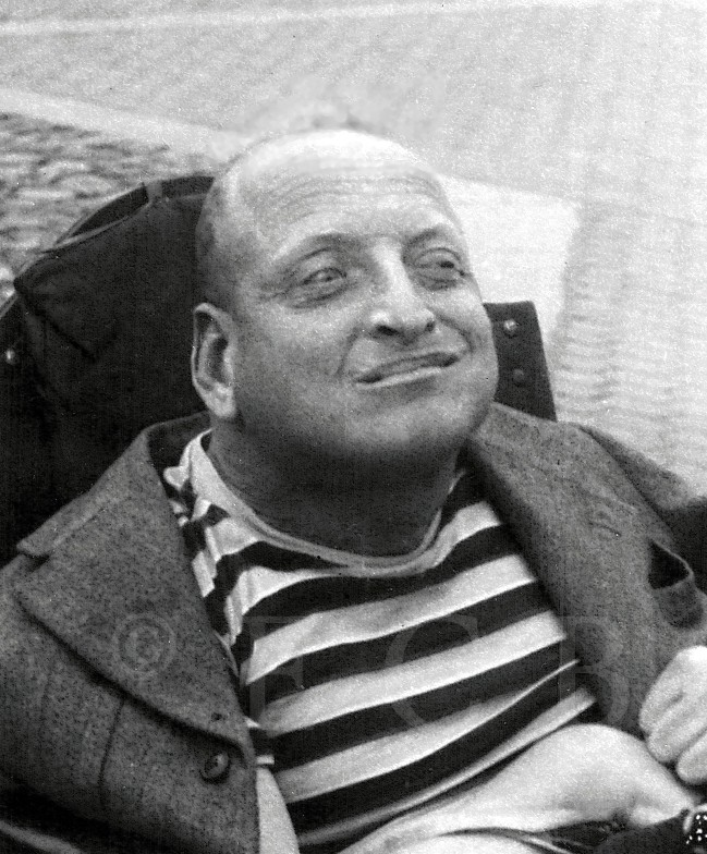 Rudolf Kende (1910 - 1958), Hudební skladatel židovského původu.